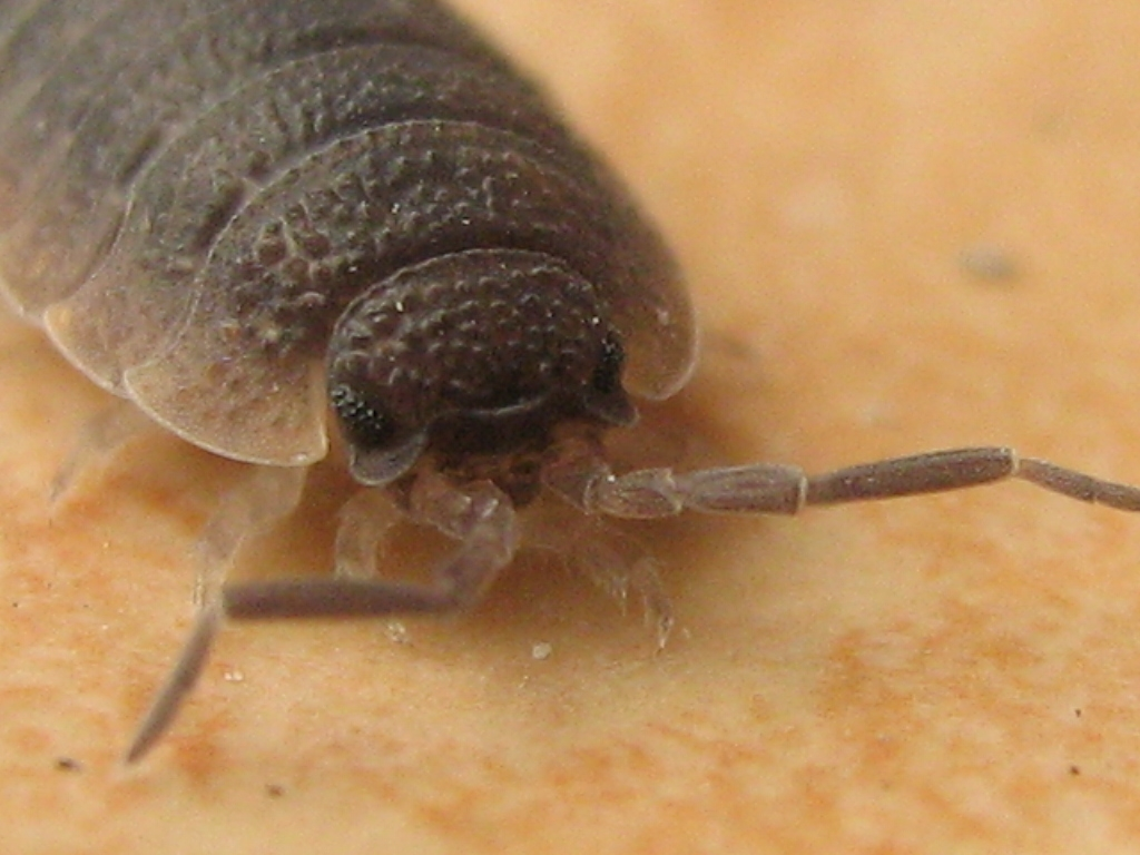 Die Kellerassel Porcellio scaber (Graal Müritz, Landkreis Bad Doberan)